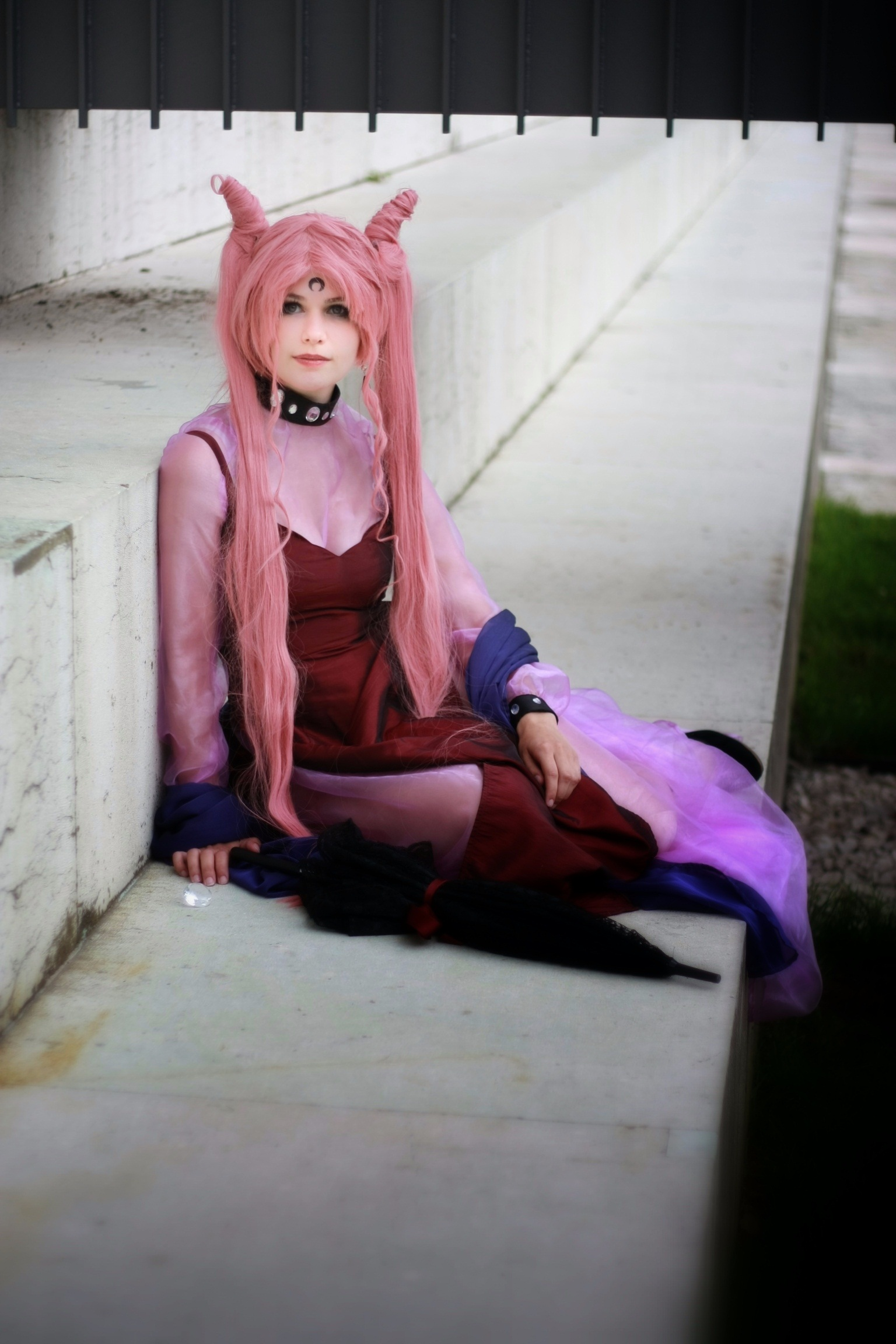 Cosplay of Black Lady - Sailor Moon